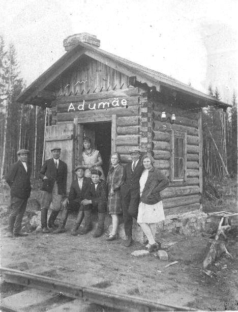 Adomäe raudteepeatuskoht Sonda–Mustvee raudteel